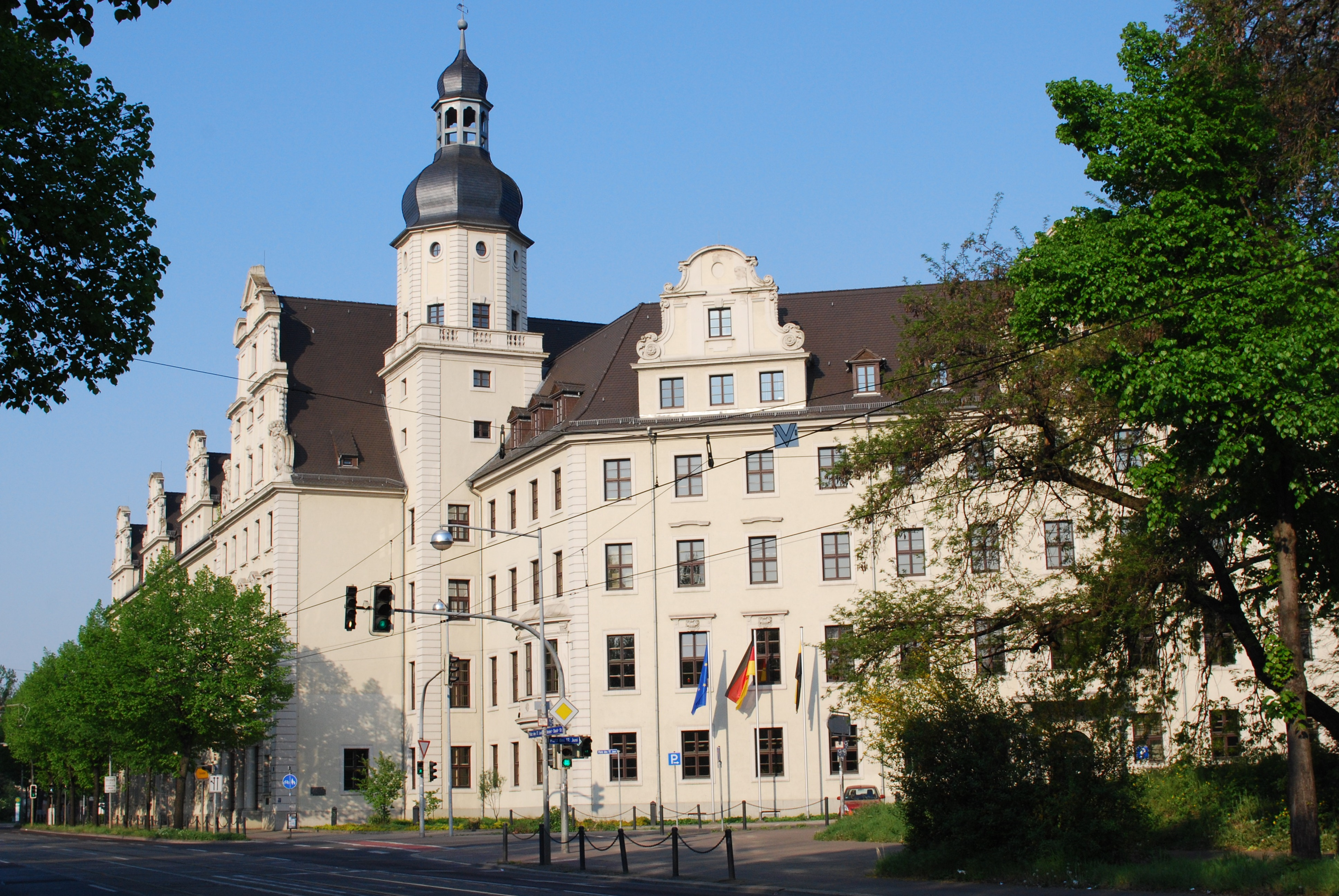 ehemaliges Polizeipräsidium, jetzt Ministerium des Innern